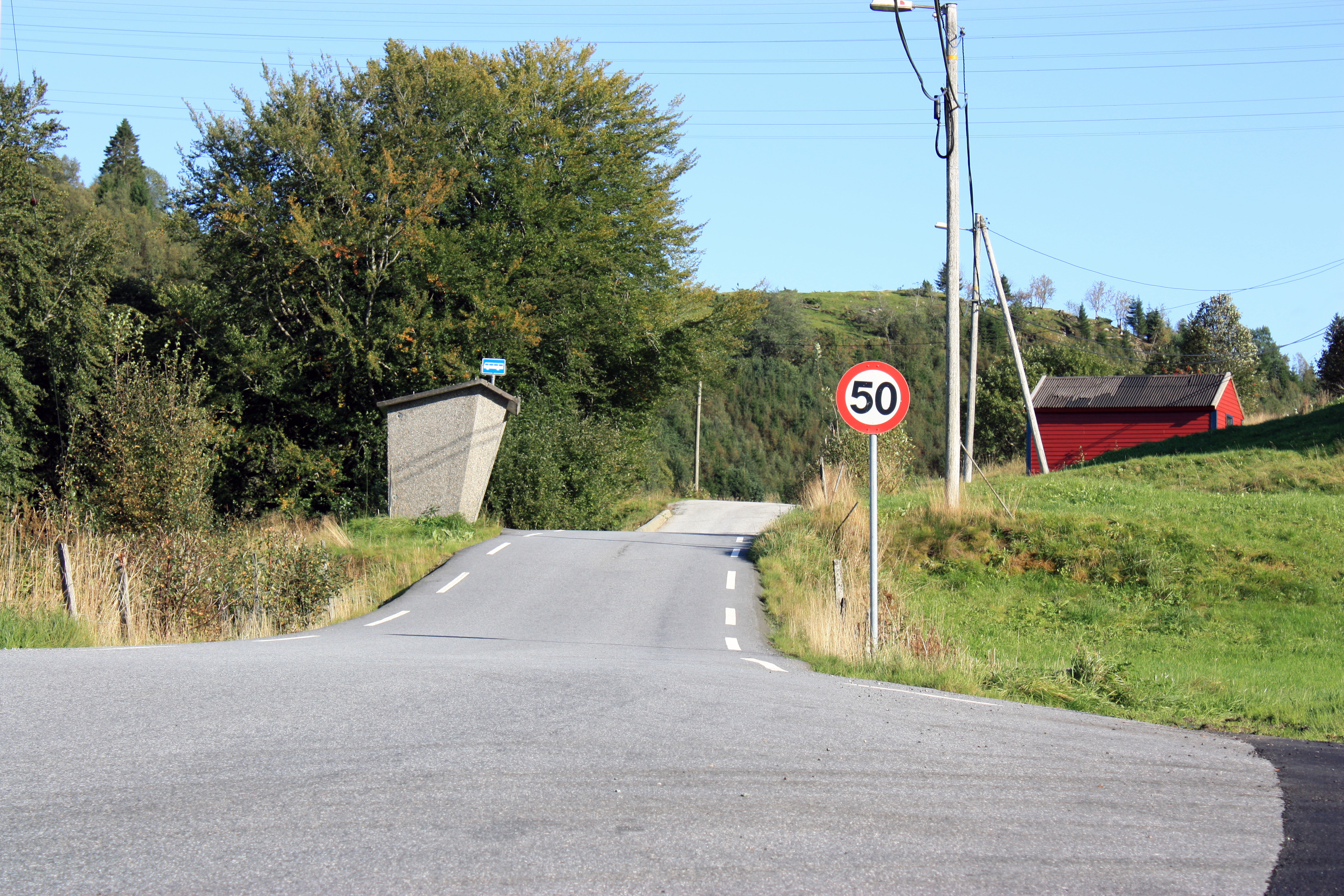 Totlandsvegen, Fana, Bergen.